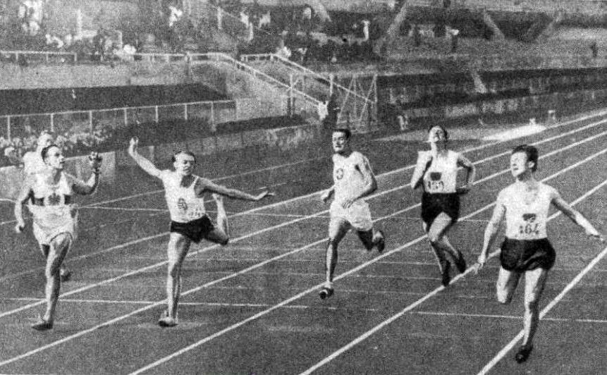 Arrivée du 100 mètres aux championnats d'Europe 1934 à Turin.